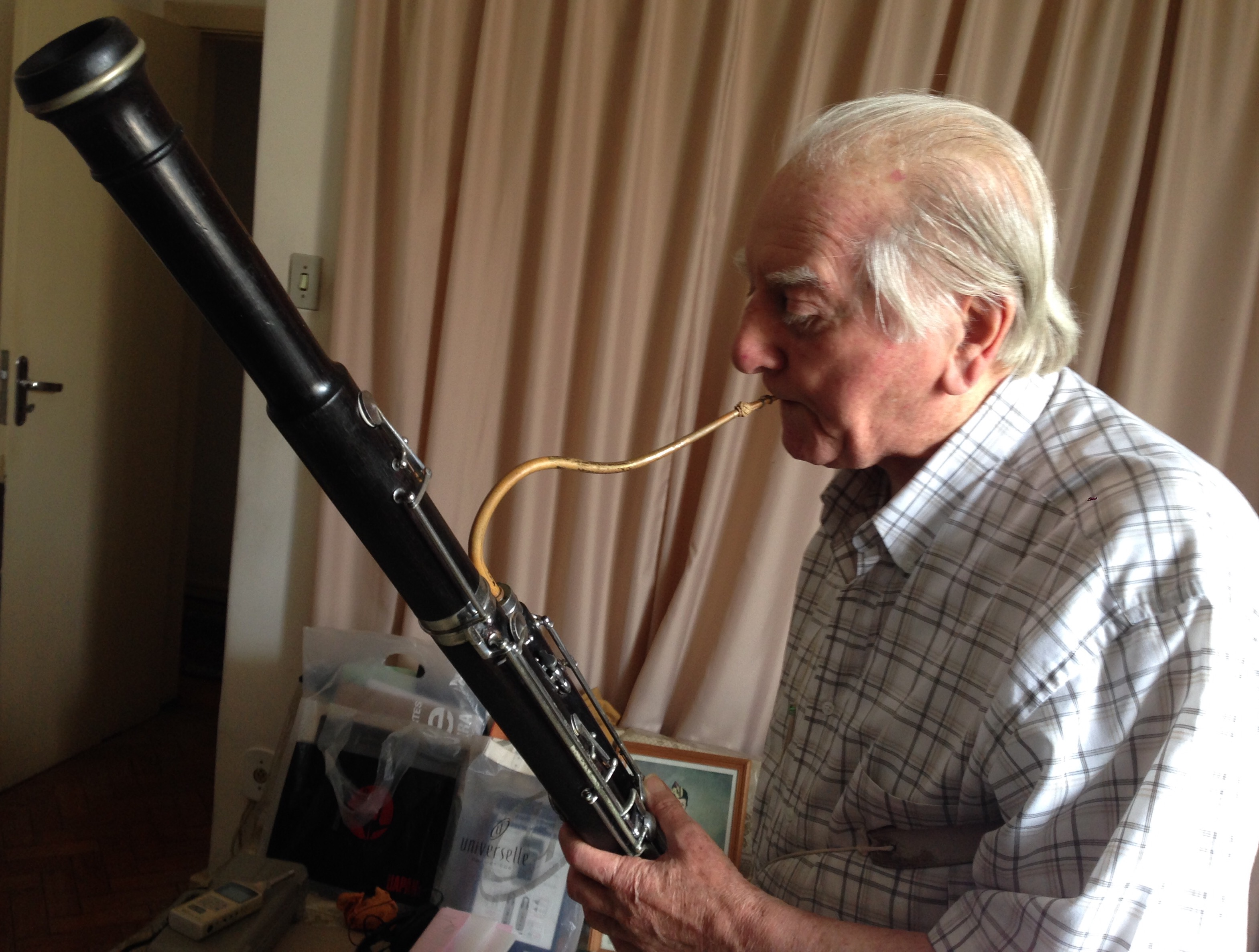 Foto de Noel Devos